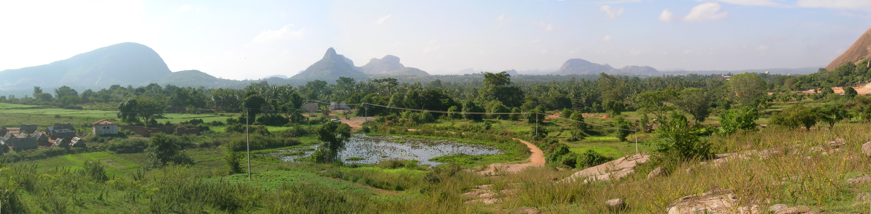 Panorama of Ramanagaram hills, India